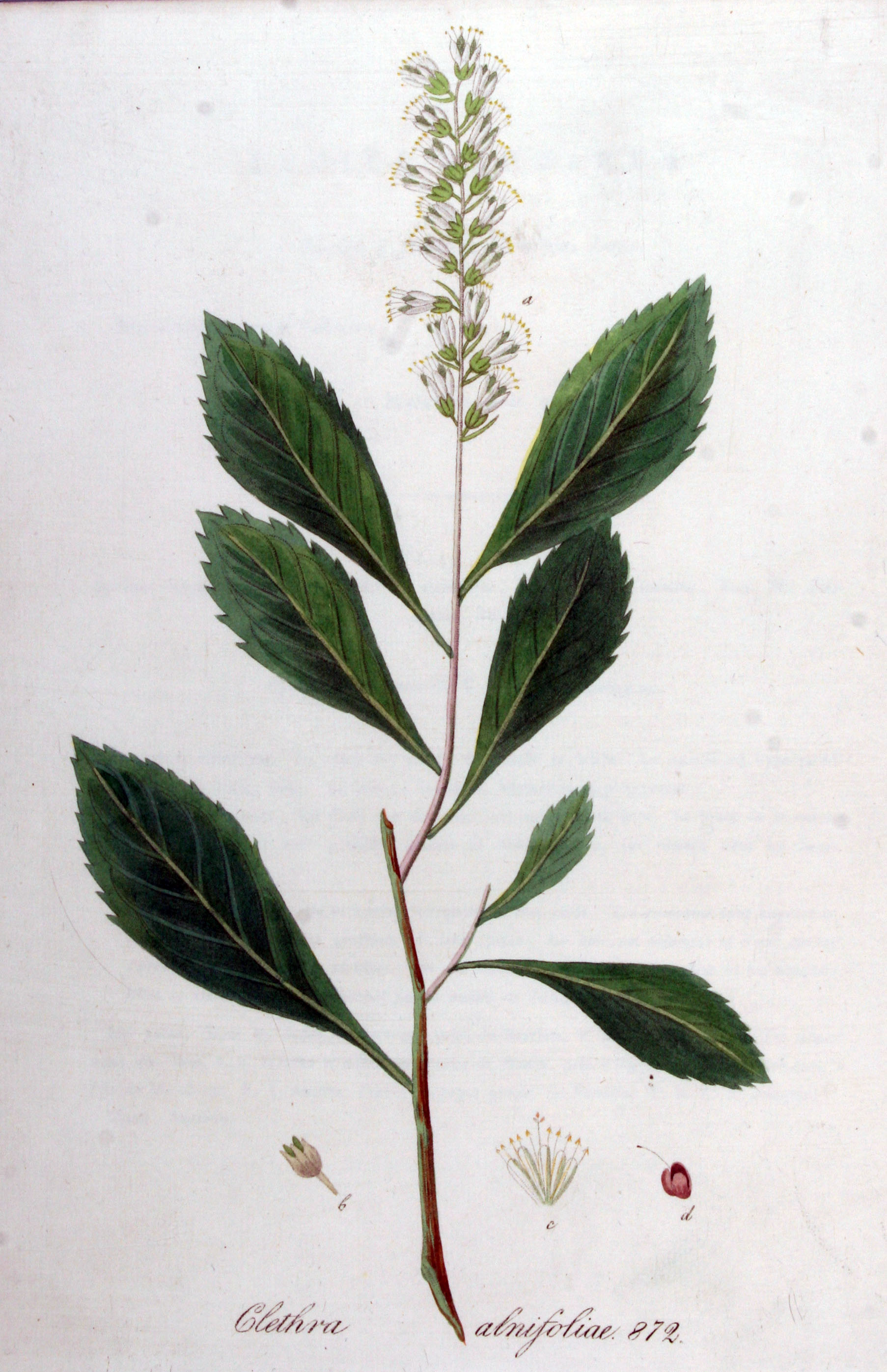 Clethra alnifolia L.